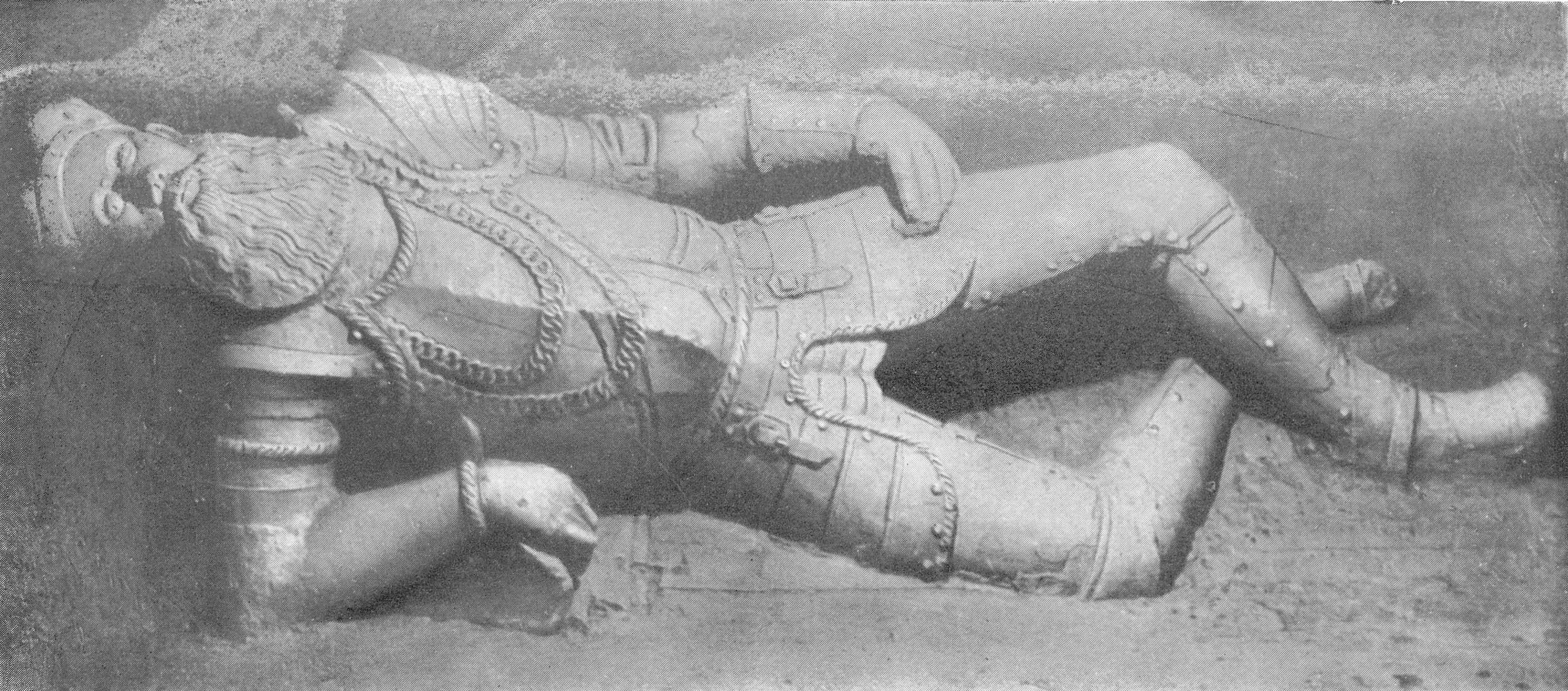 Фрагмент надгробку князя Костянтина Острозького в Успенському соборі Києво-Печерської Лаври. Фігура князя. 1579 рік.